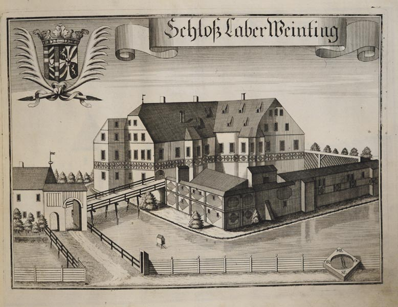 “Schloß LaberWeinting” (Laberweinting), aus: Beschreibung des Churfürsten- u. Hertzogthumbs Ober- und Nidern Bayrn. Rentamt Landshut, Gericht Kirchberg, 1723